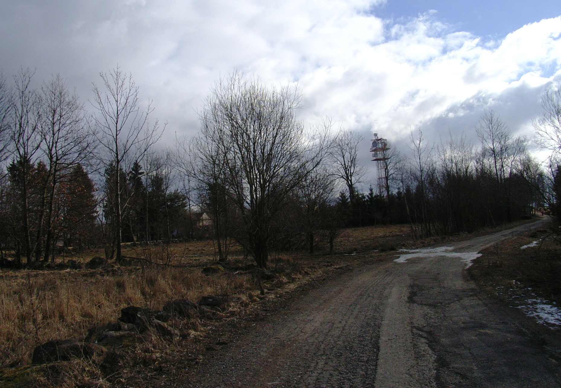 Česky: Retranslační věž na vrcholu Javorové skály